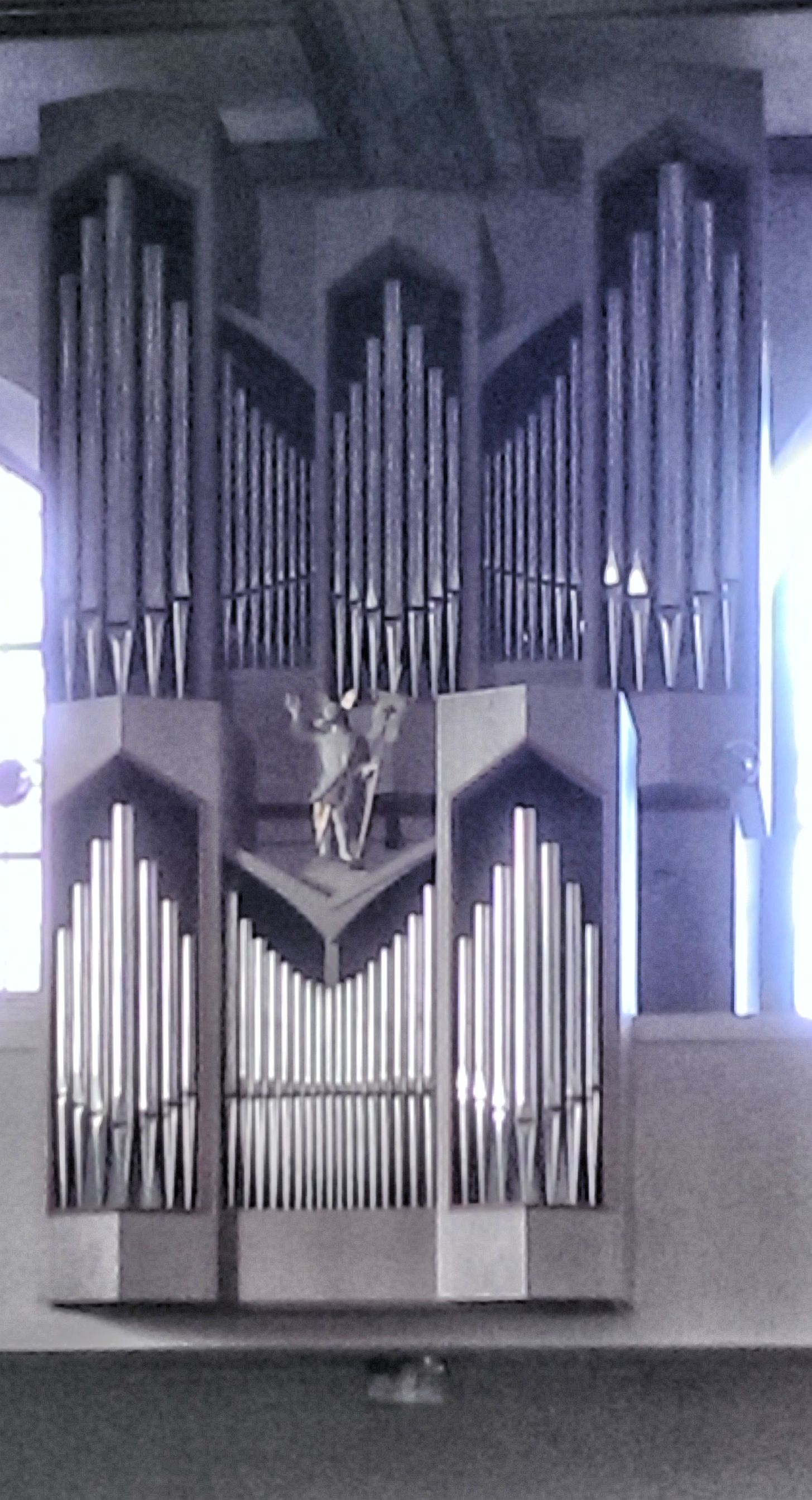 Blick vom Altarraum zur Orgel